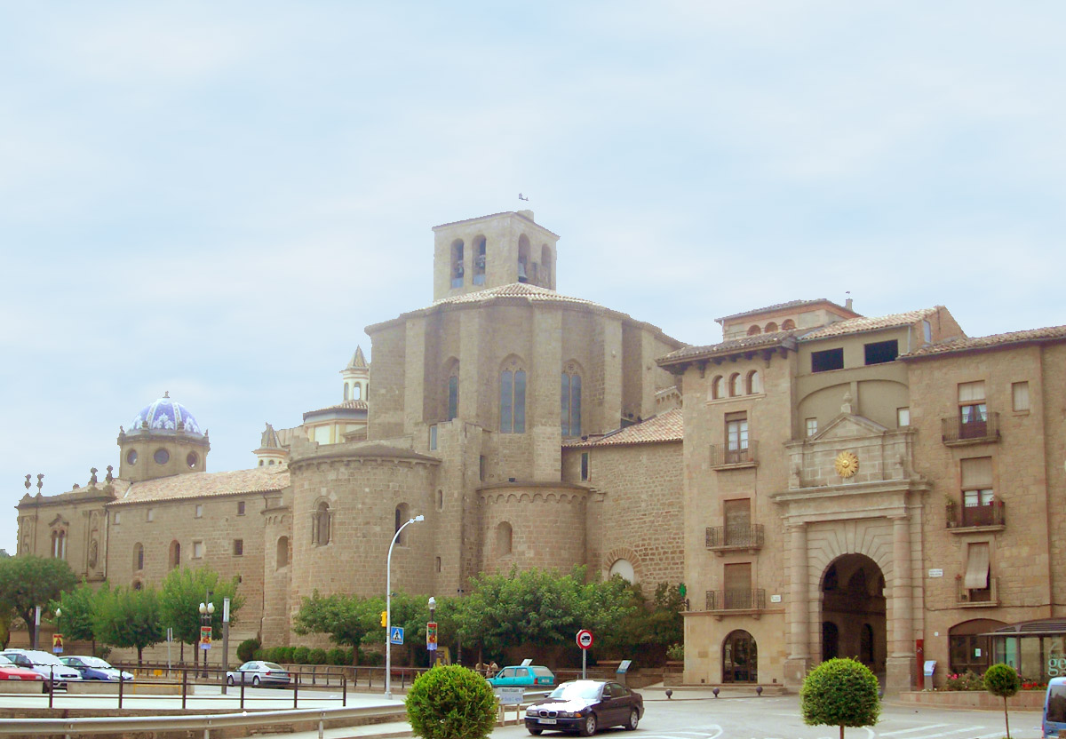 Catedral i portal del Pont a Solsona